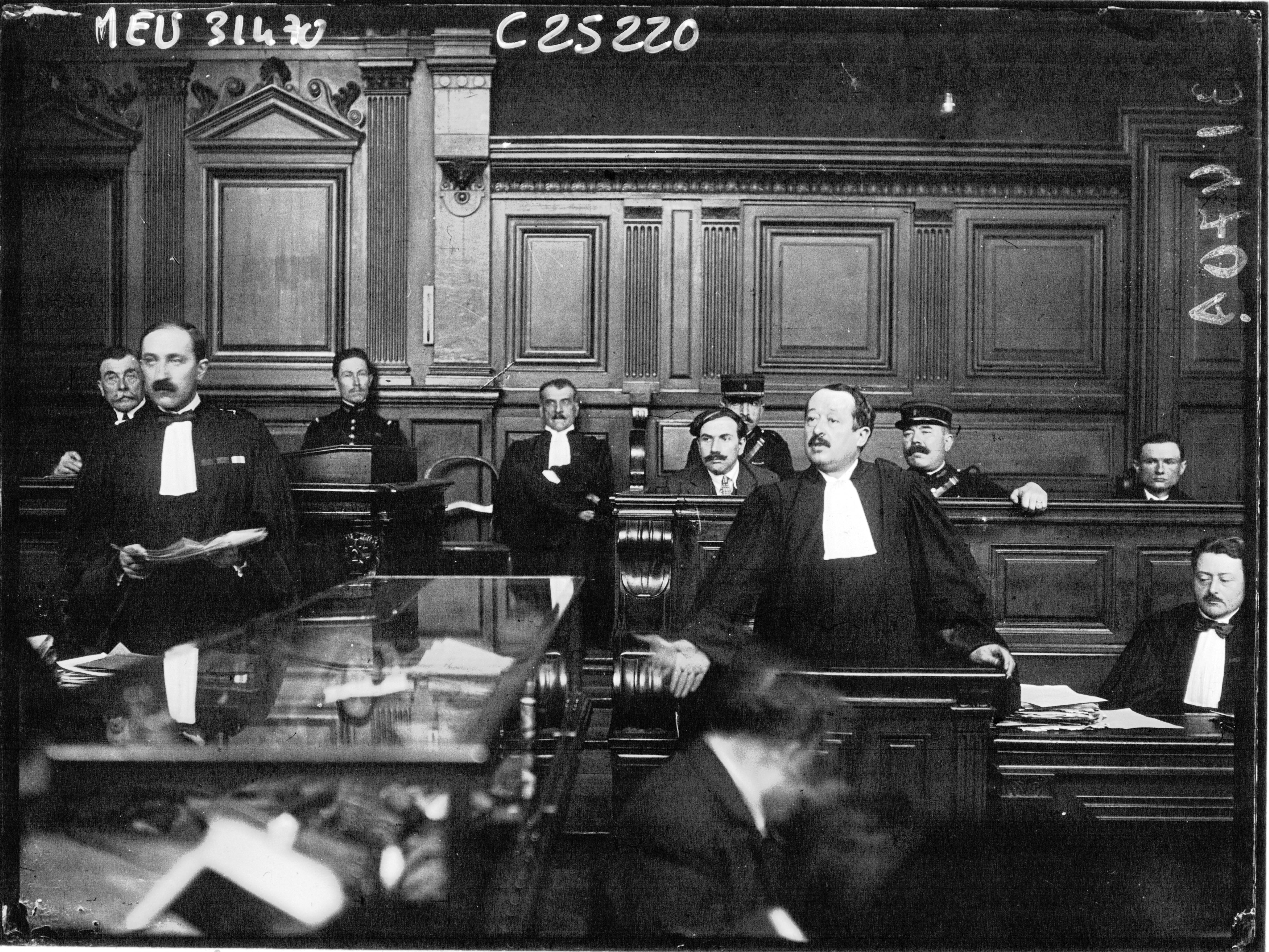 Cour d'assises de la Seine : affaire de la rue Damrémont. De gauche à droite : Maîtres Missoffe, Berthon et Fournier. Au banc des accusés : Clerc et Bernardon.